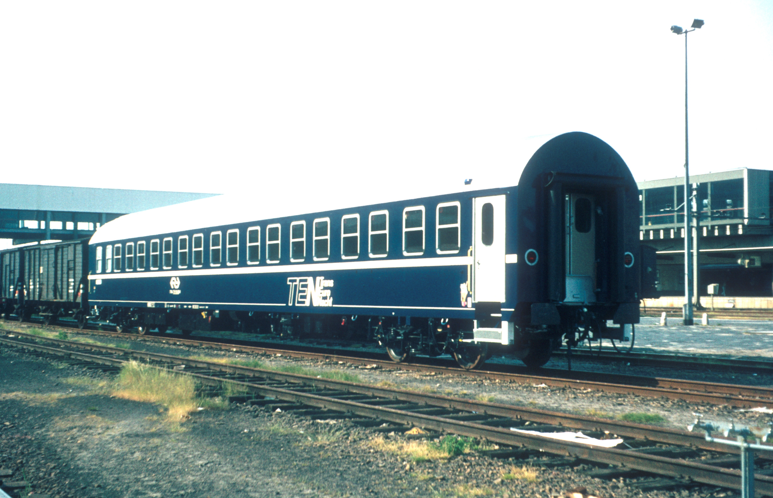 NS slaaprijtuig van het type T2S na aflevering te Utrecht Centraal. In totaal werden 63 rijtuigen geboud; er werden 2 rijtuigen bij NS aangeschaft, er werden .. rijtuigen bij DB aangeschaft, er werden 2 rijtuigen bij DSB aangeschaft, er werden .. rijtuigen bij FS aangeschaft, er werden .. rijtuigen bij ÖBB aangeschaft en er werden .. rijtuigen bij SBB aangeschaft. Bij de DB was dit rijtuig type WALBsmh-166. [1] De NS rijtuigen zijn in 2002 verkocht aan Rollende Landstraße Oostenrijk.